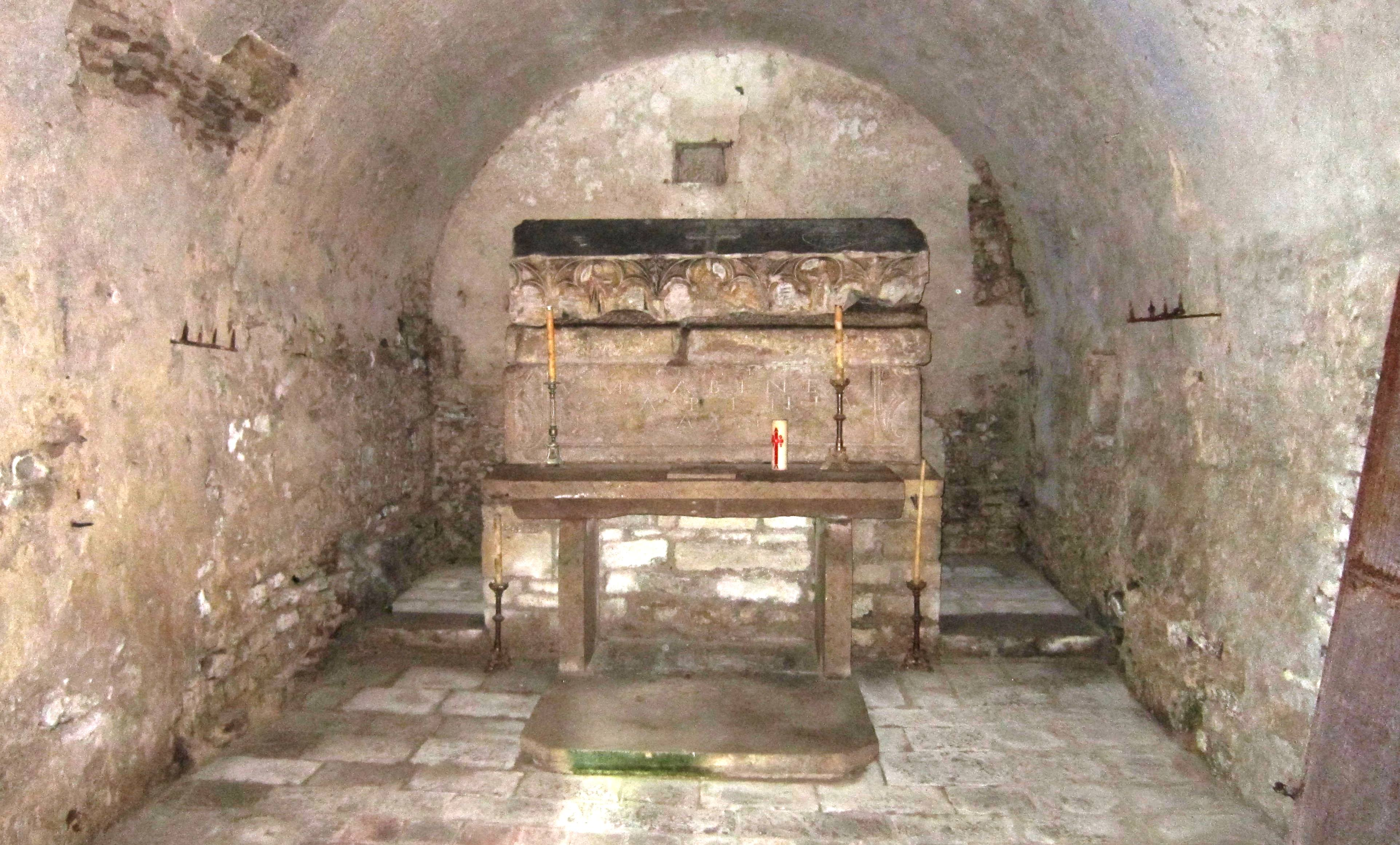 Le sarcophage de Saint-Valentin dans la crypte de Griselles Côte-d'Or